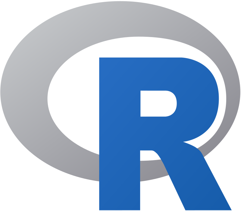 R λογότυπο